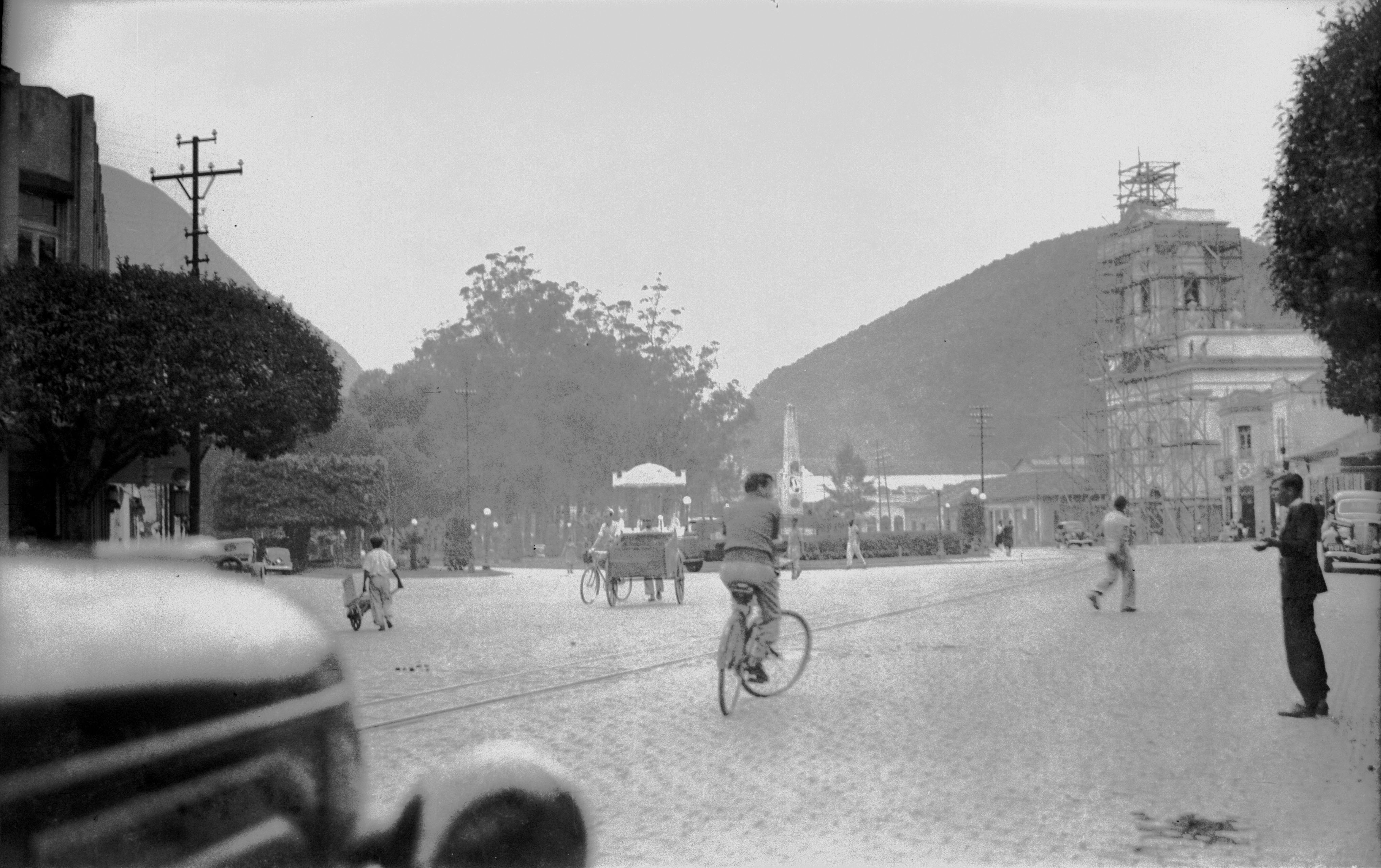 Nova Friburgo em 1940